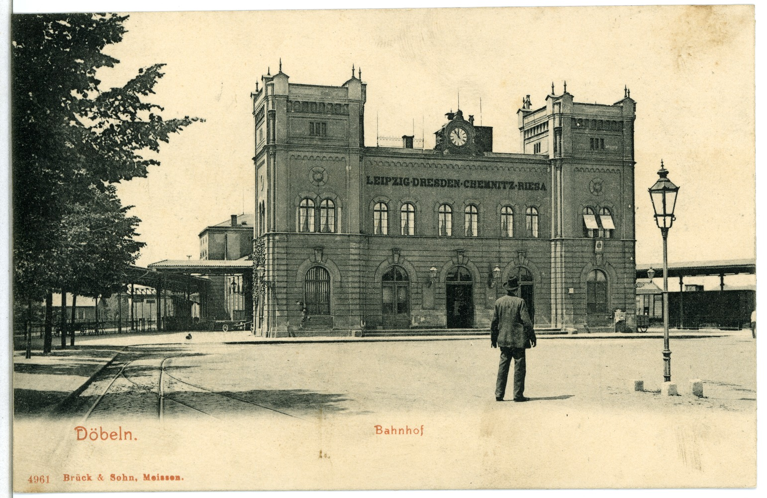 Döbeln; Bahnhof Diese Ansichtskarte stammt vom Kunstverlag Brück & Sohn aus Meißen ( Die Karte hat die eindeutige Nummer 04961 und ist in höherer Auflösung beim Verlag erhältlich. Sie wurde im Rahmen einer Kooperation zwischen Wikipedianern und dem Kunstverlag für Wikimedia Commons zur Verfügung gestellt.